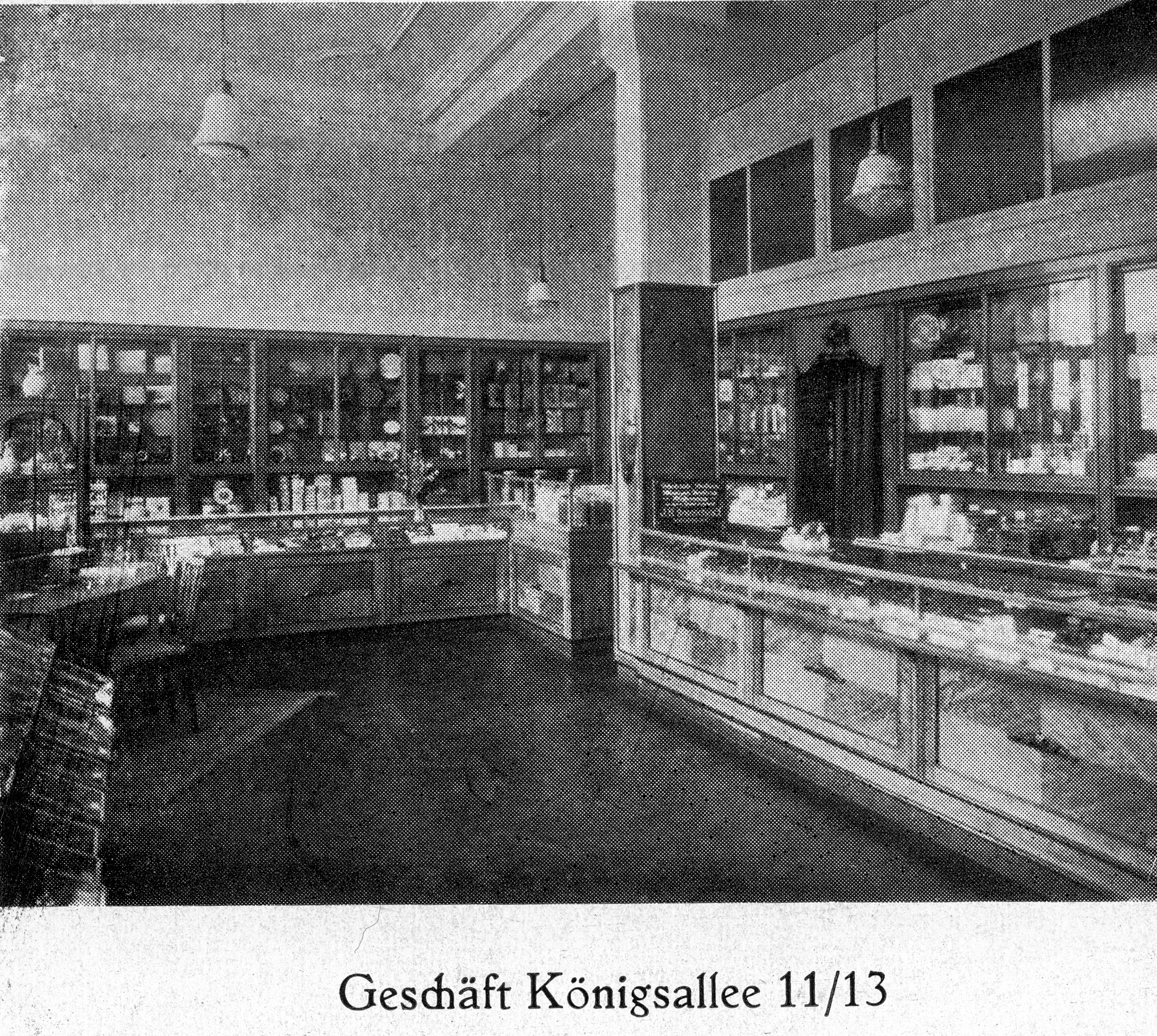 Hugo Schmölz (geb. 21. Januar 1879 in Sonthofen; gest. 27. April 1938 in Köln), Düsseldorf, Ladenlokal,_Geschäft_Königsallee_11_und_13.jpg